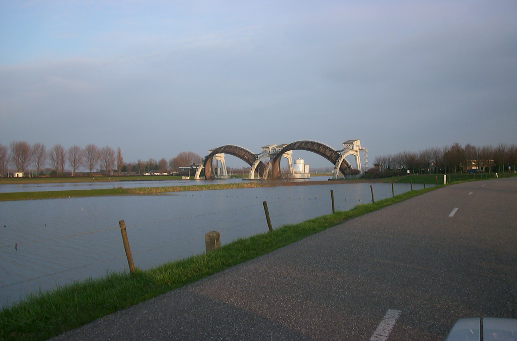 de stuw van Hagestein bij hoog water